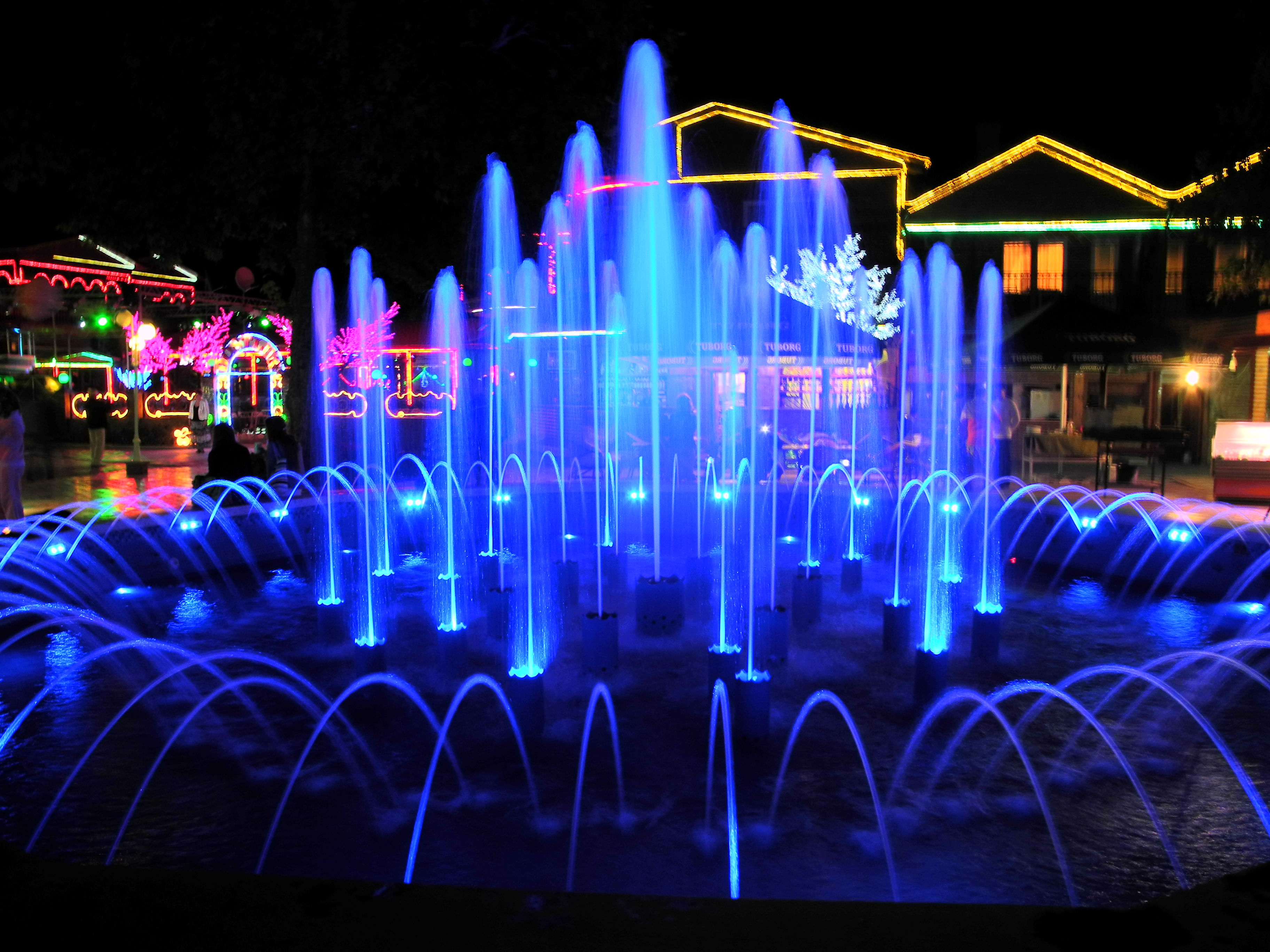 Фонтан на Кипарисовой алее